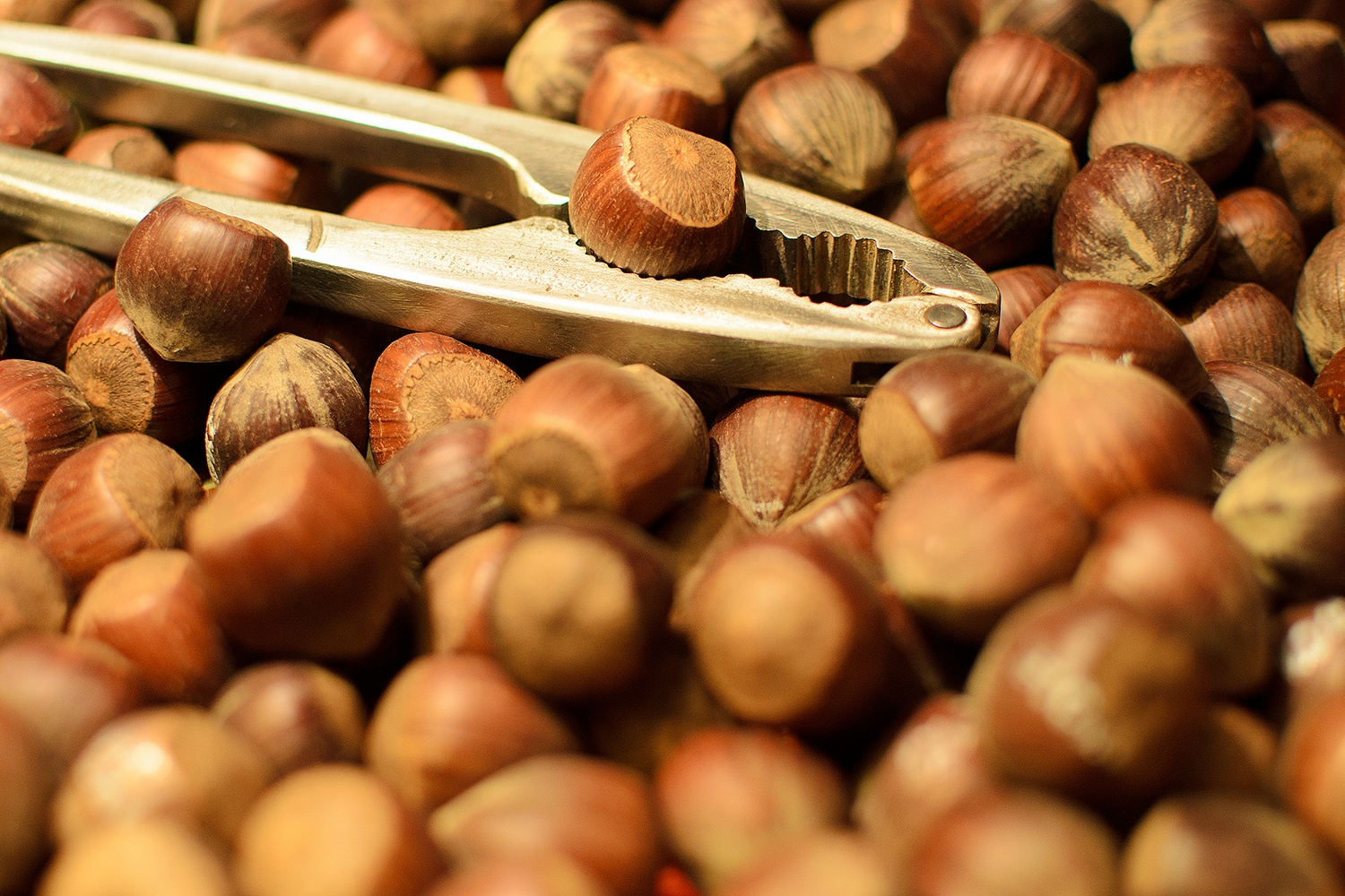 Haselnüsse, Datum/Uhrzeit: 24.12.2013 20:48:57